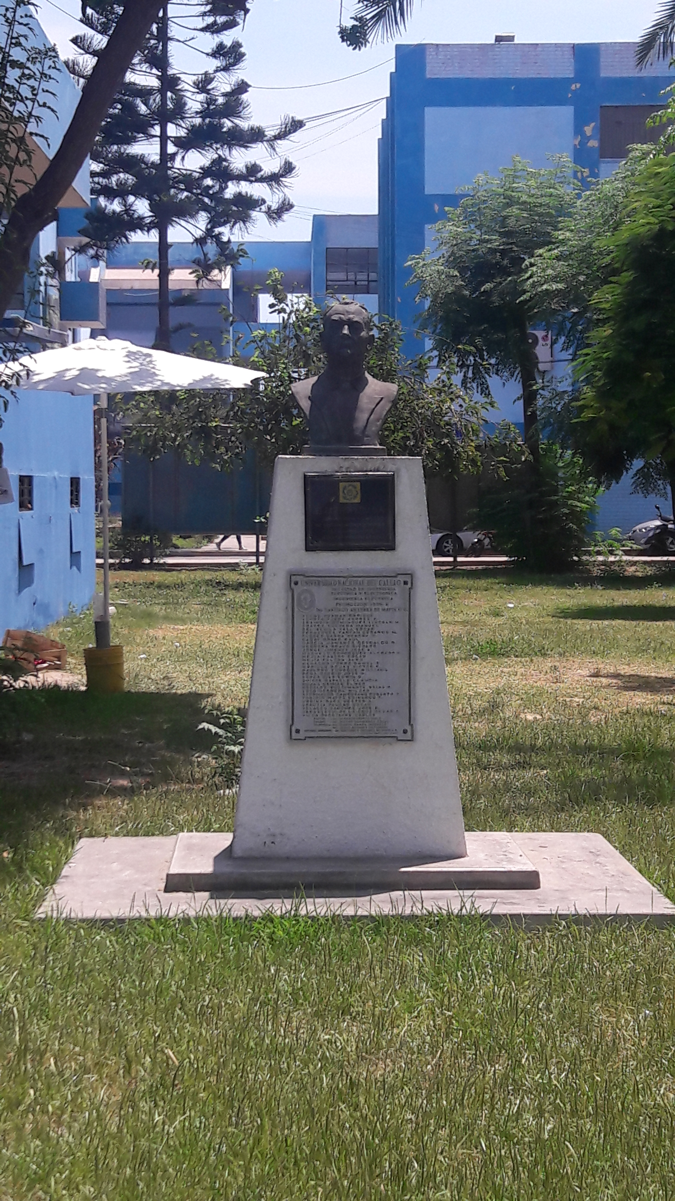 Santiago Antúnez de Mayolo-Monumento UNAC